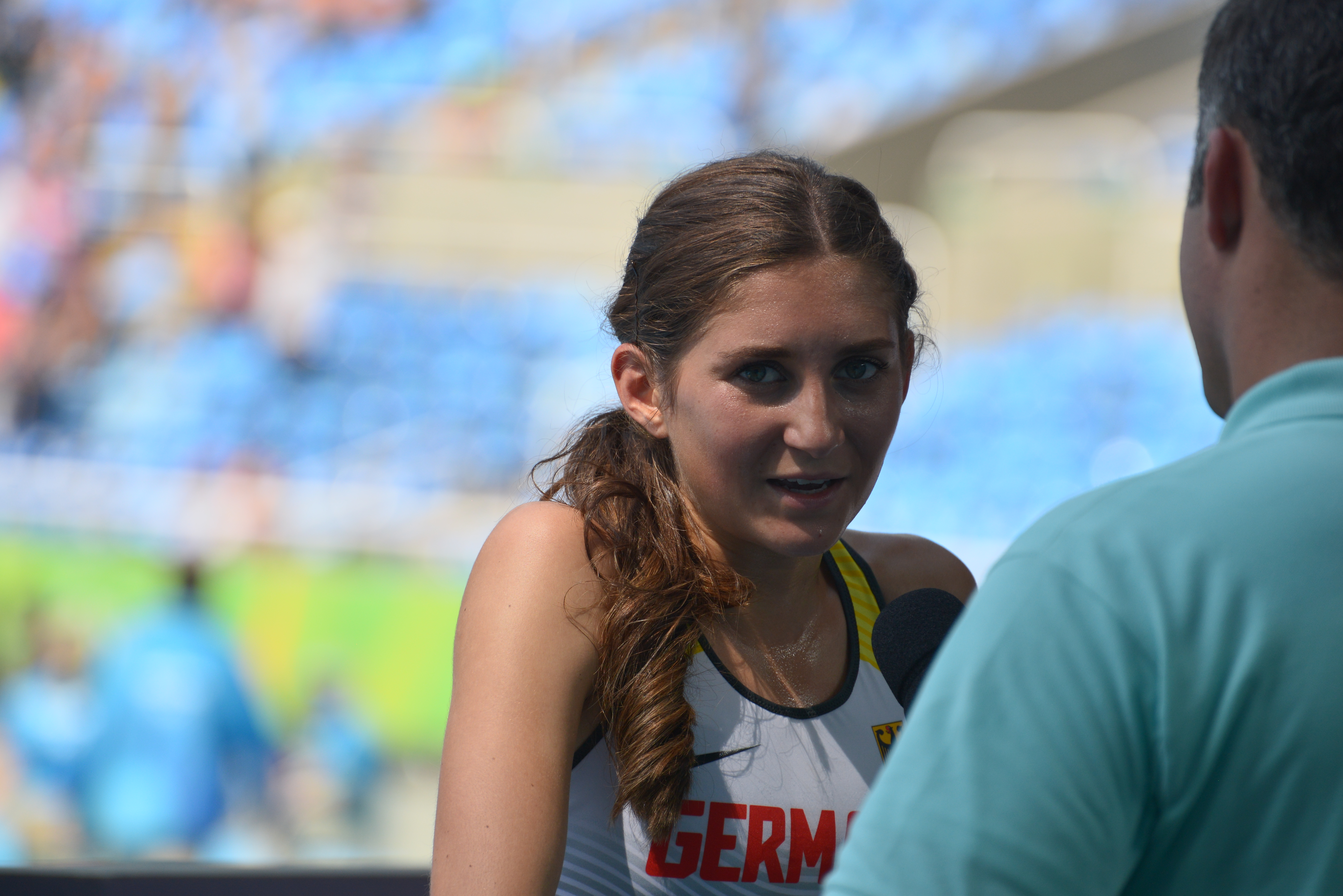 Finale du 3000m steeple des jo de Rio 2016. L'allemande Gesa Felicitas Krause en interview